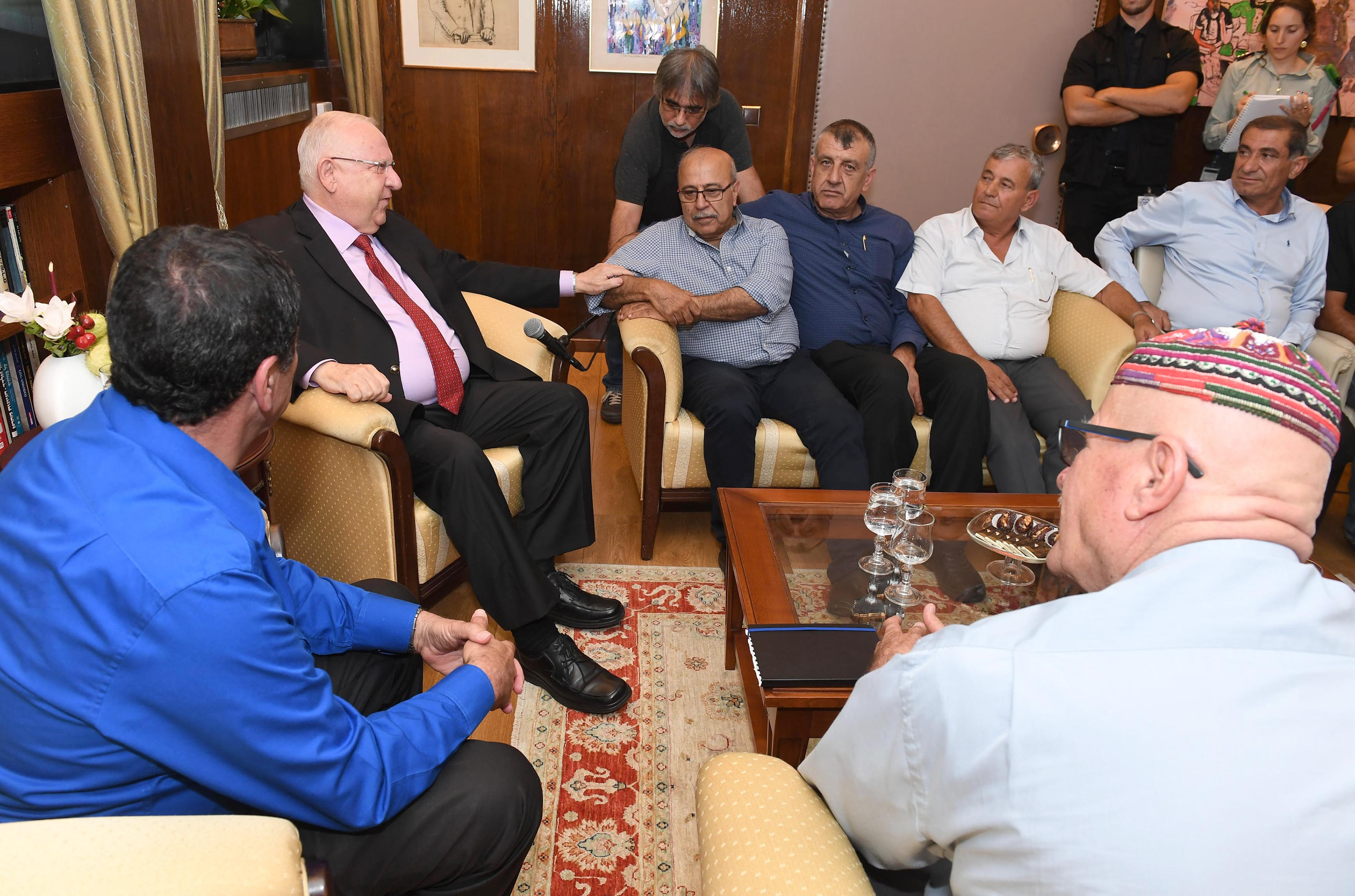 ראובן ריבלין נשיא מדינת ישראל נפגש עם ראשי הרשויות הדרוזיות בישראל שביקשו להגיע אליו לאחר פגישתם עם ראש הממשלה ולהביע את דאגתם לנוכח חוק הלאום בין ראשי הרשויות רפיק חלבי וניהאד משלב